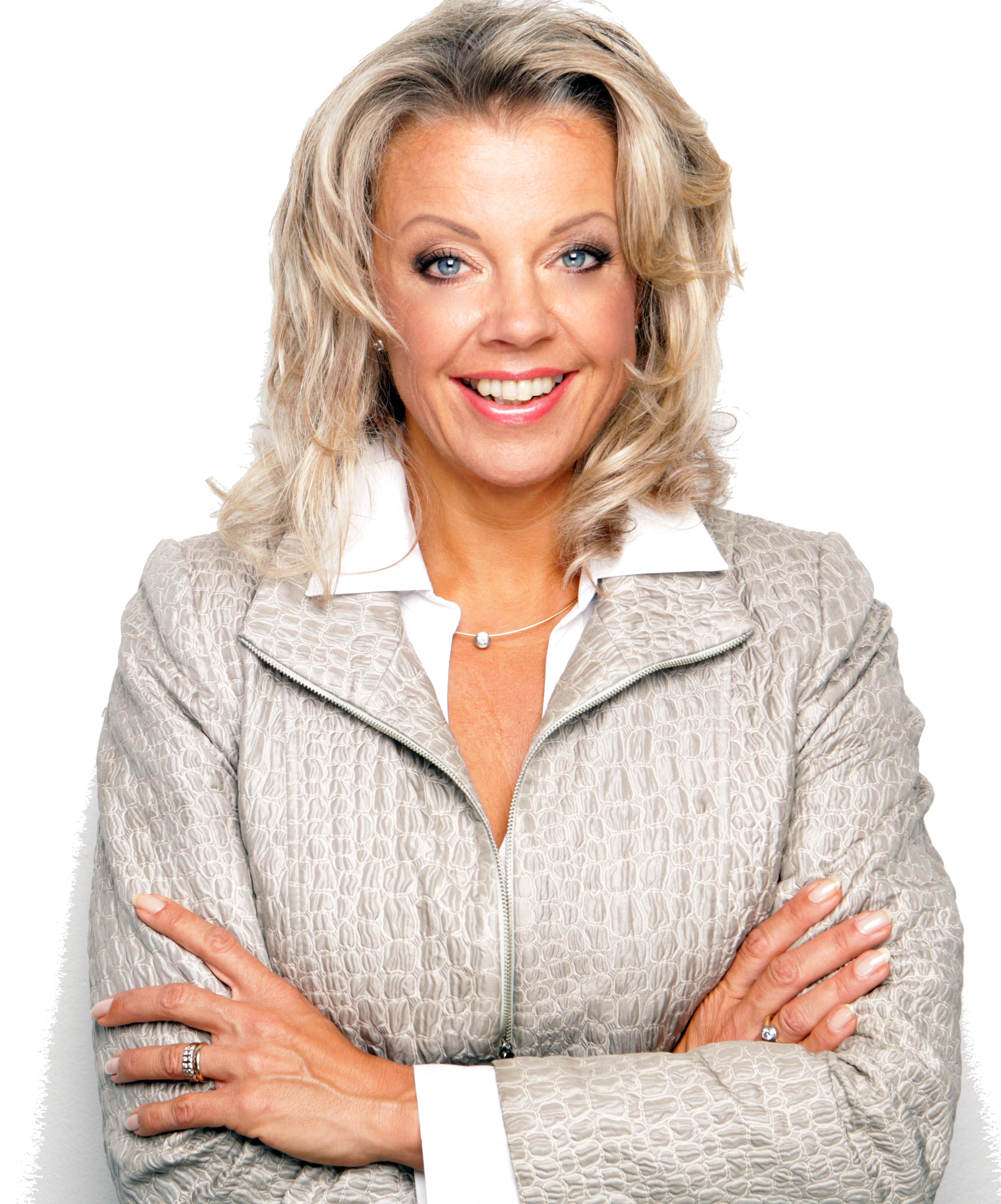 Sabine Schwind von Egelstein